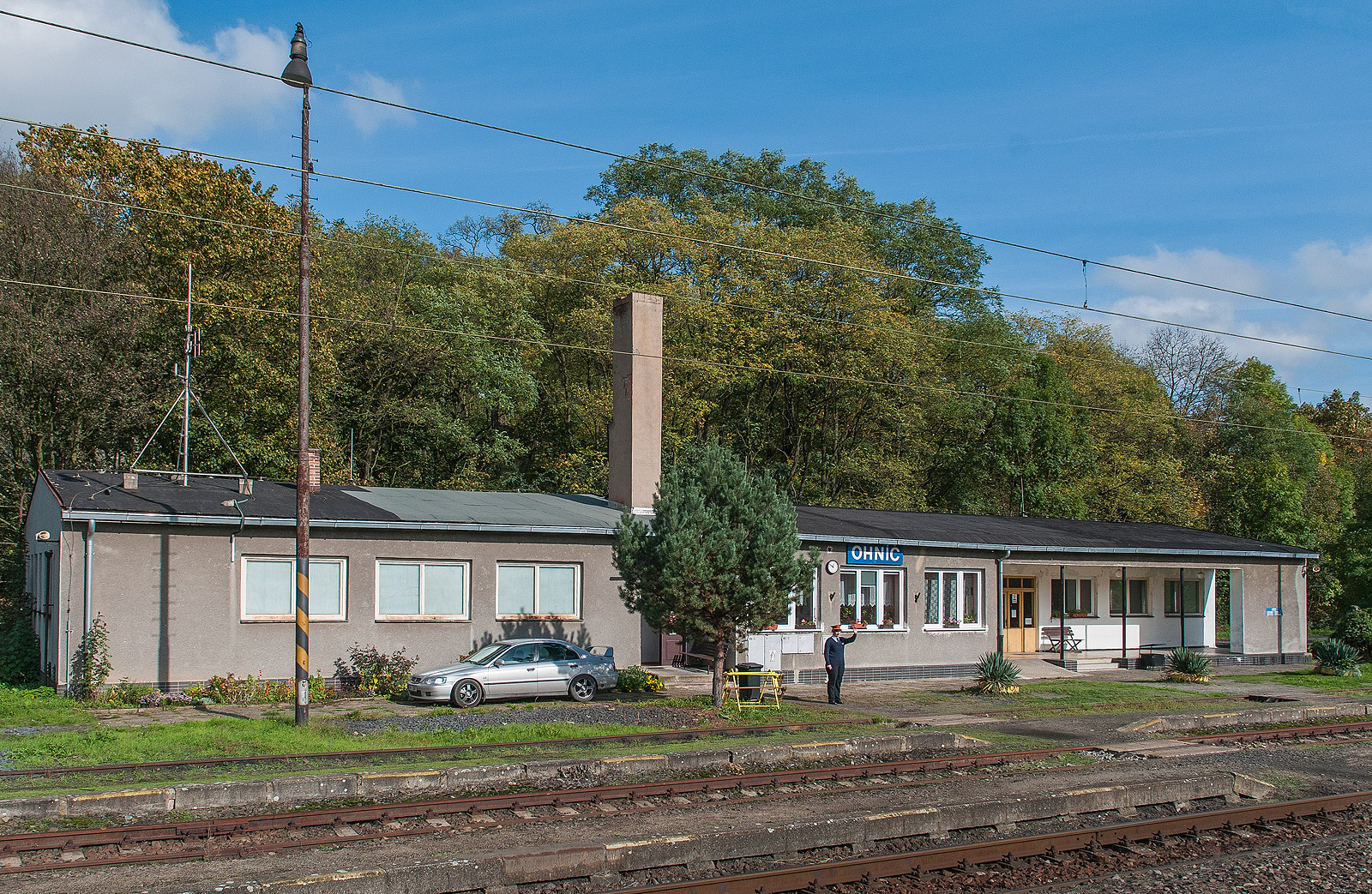 Železniční stanice Ohníč na trati č. 131 z Ústí nad Labem do Bíliny.